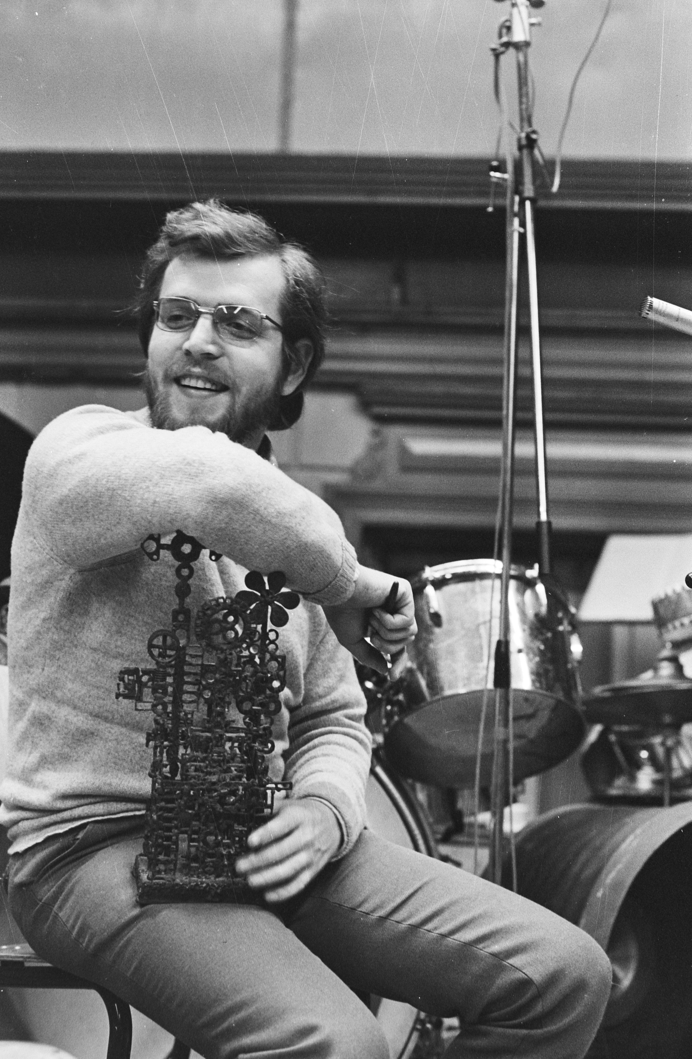 Willem Breuker, rietblazer en componist ontvangt Wessel Ilckenprijs in Frascati, Amsterdam.